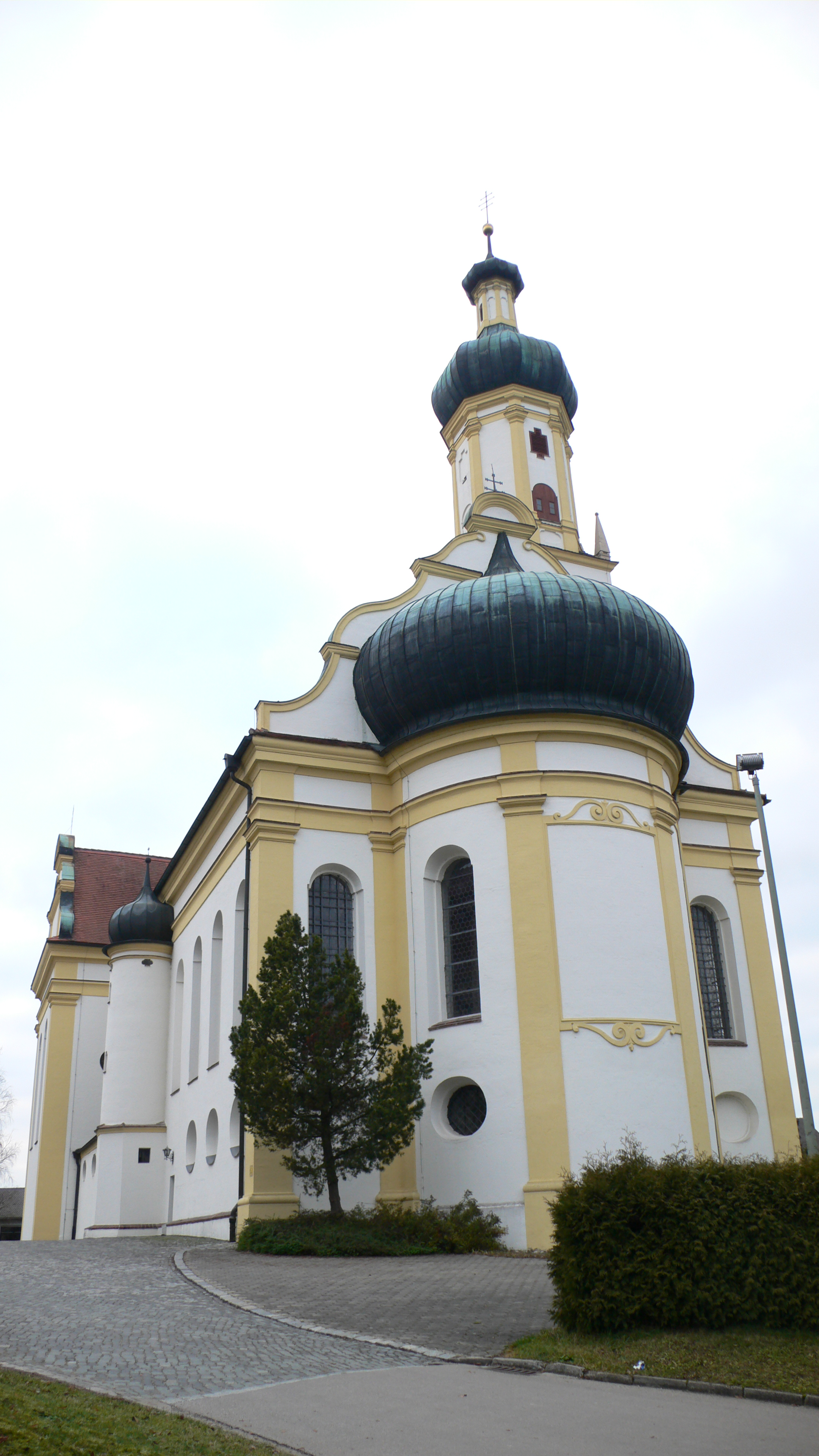 Wallfahrtskirche St. Jakobus und St. Laurentius in Biberbach (Schwaben). Ansicht von der Zufahrt auf der Ostseite aus.